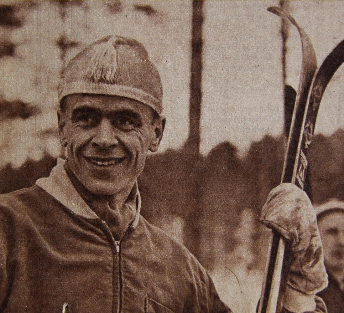 Toimi Alatalo SM-pikamatkan voittajana Kajaanissa 1959